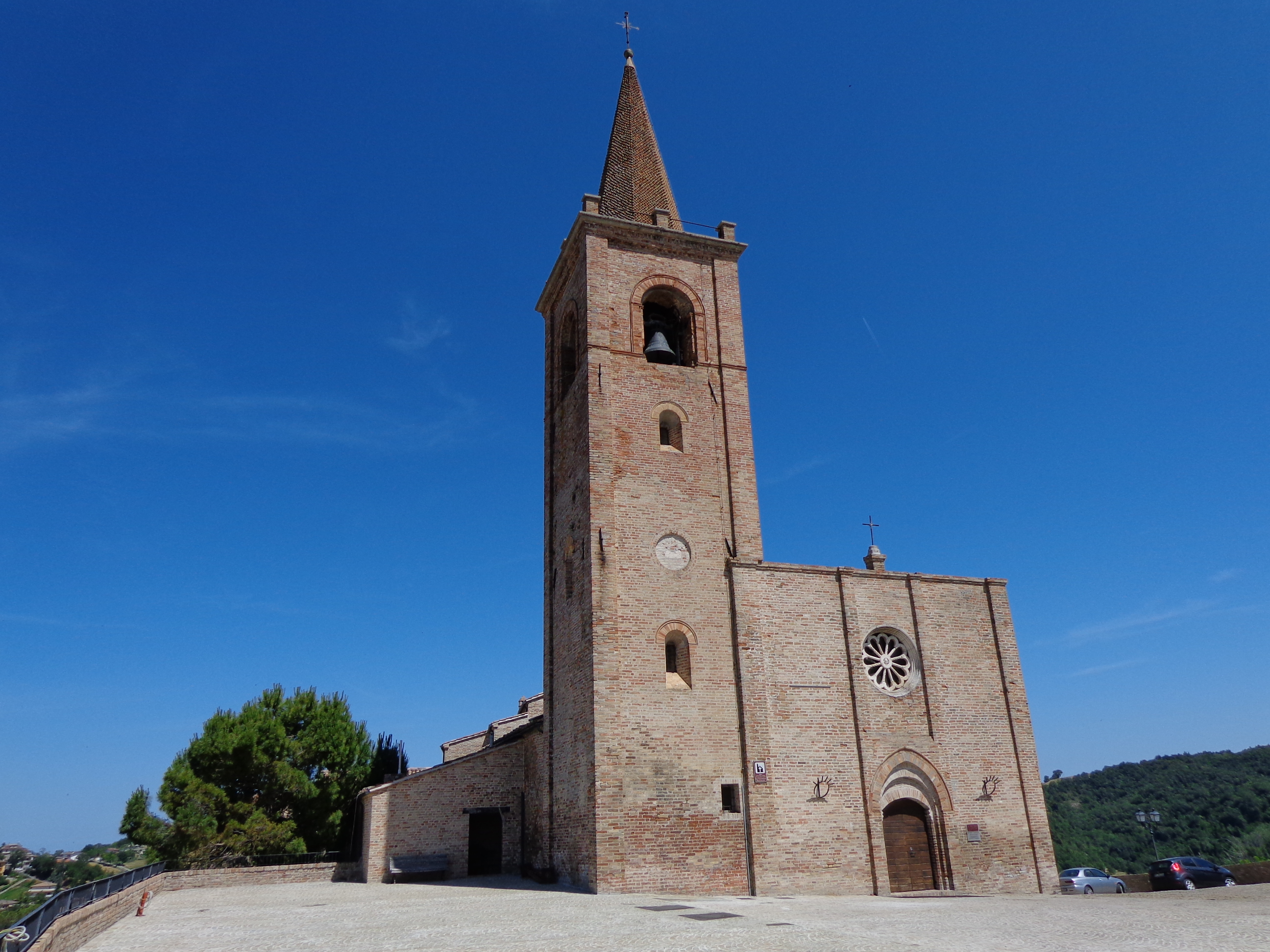 Castignano, la chiesa dei Santi Pietro e Paolo in stile romanico-gotico XIV-XV secolo.